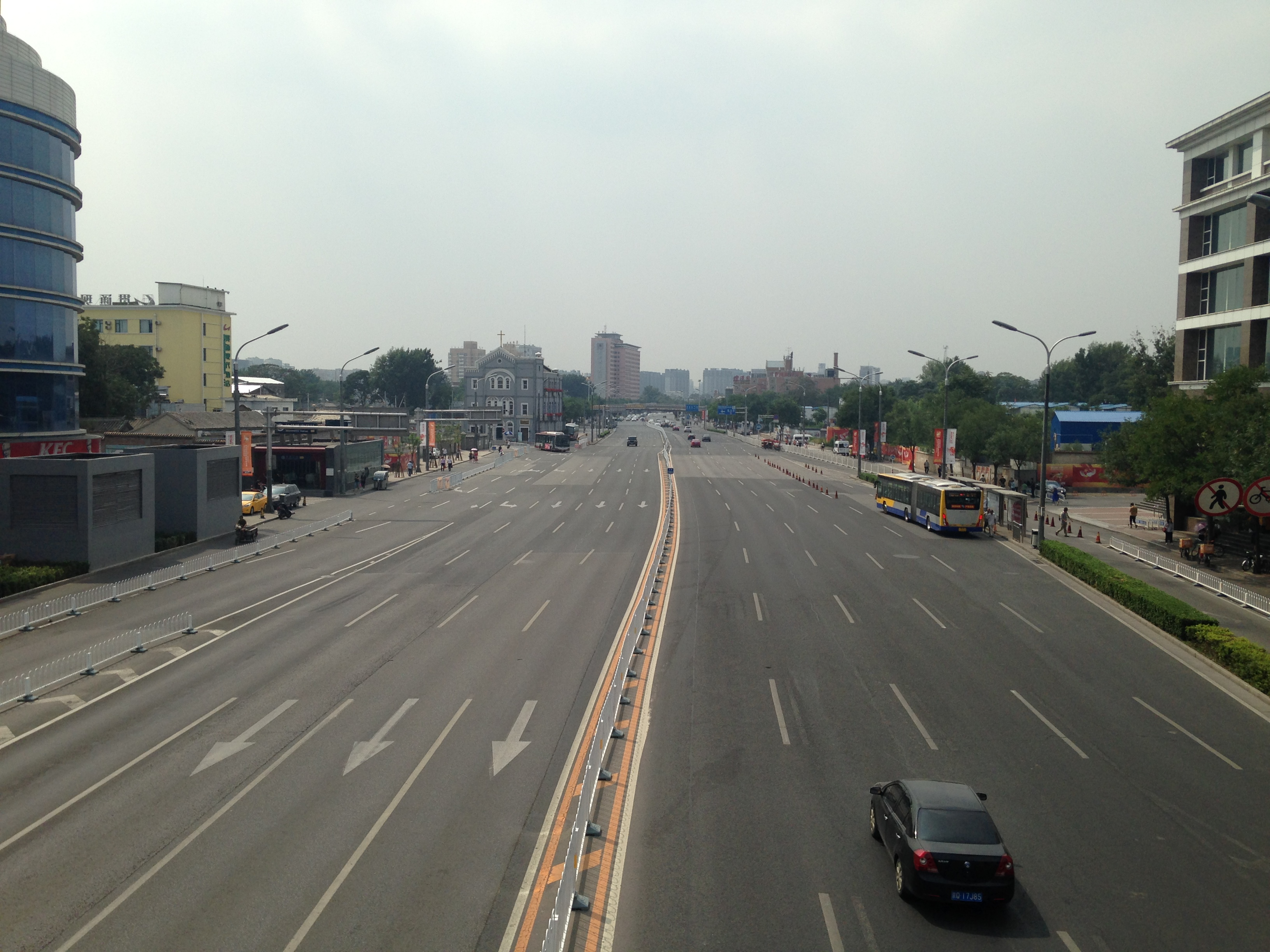 珠市口駅付近の歩道橋より望む珠市口西大街